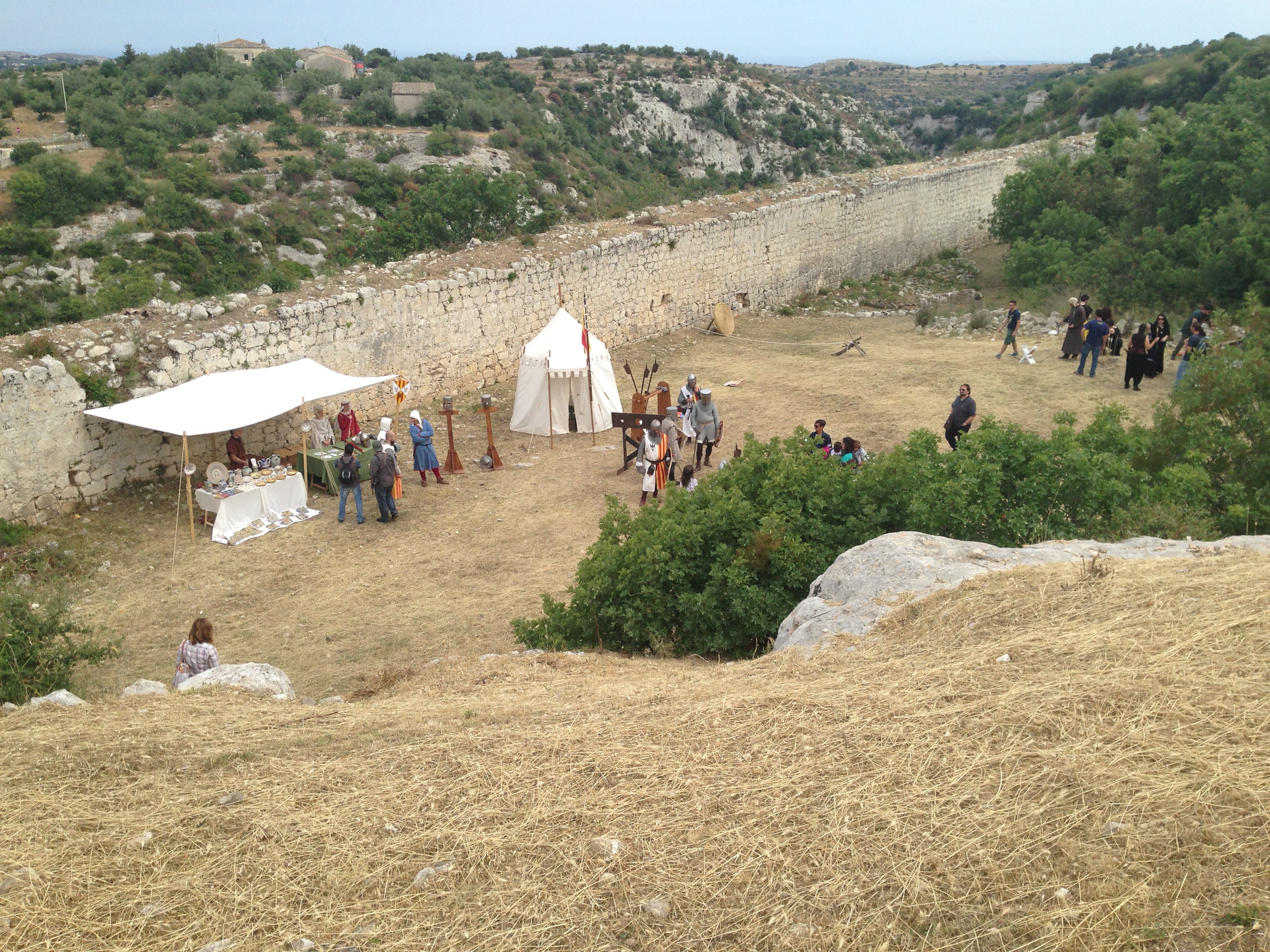 festival Alveria